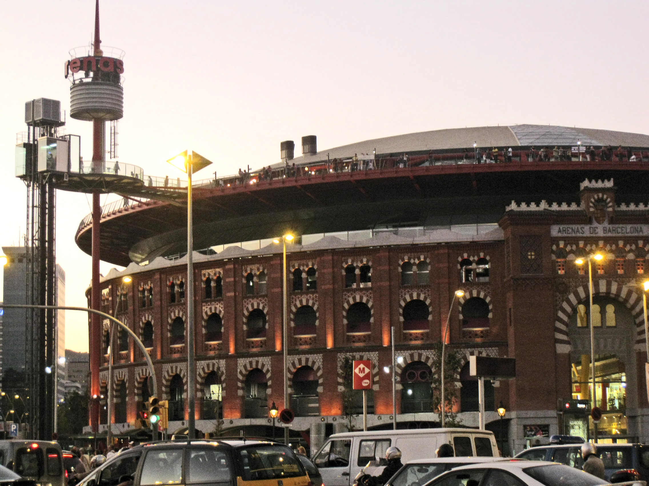 Antiga plaça de toros de les Arenes, a la plaça d'Espanya de Barcelona, actualment centre comercial. Edifici neomudèjar construït per August Font i Carreras (1899-1900).